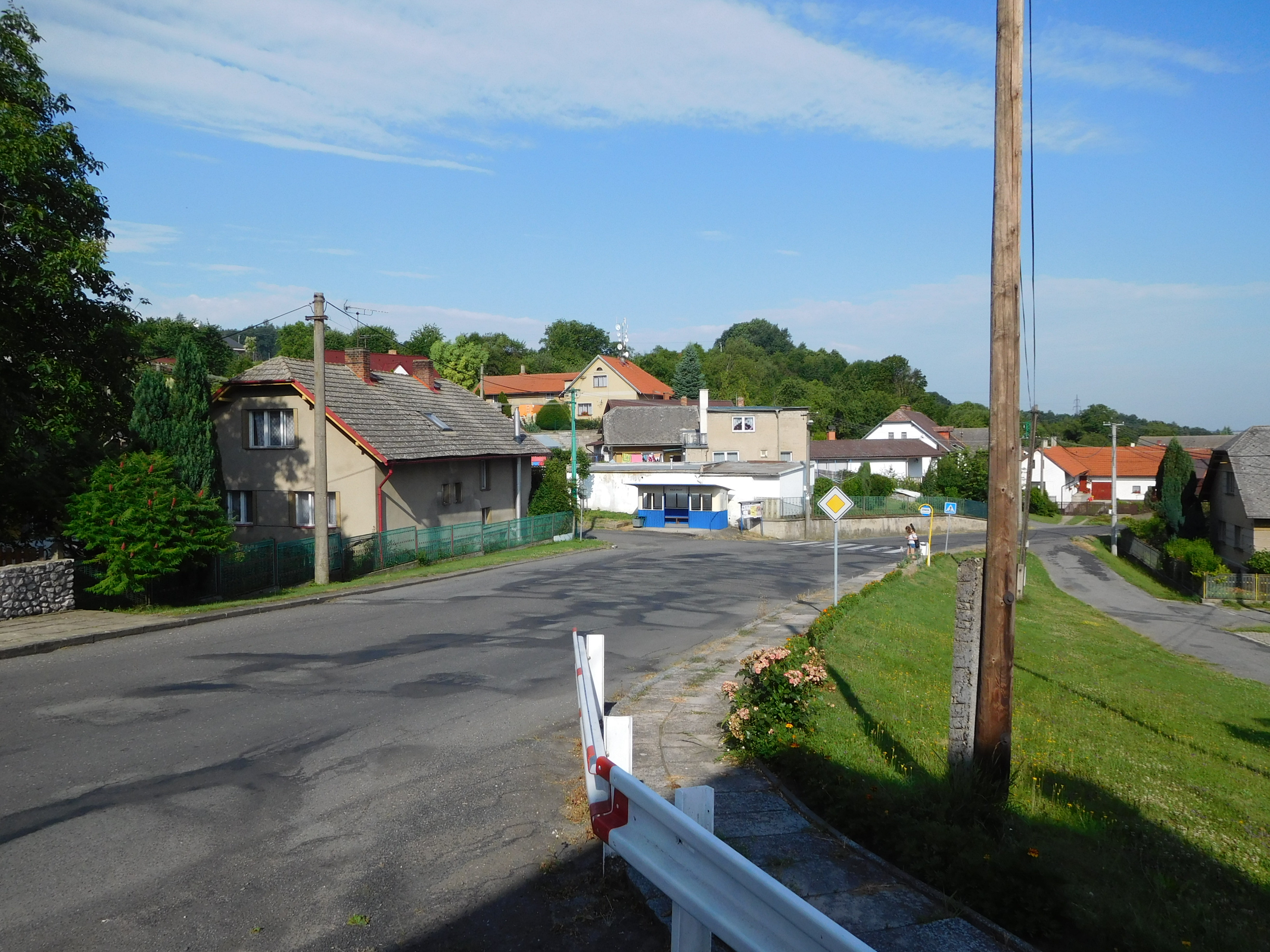 Holé Vrchy - střed obce